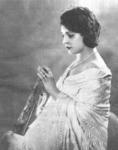 Fotografía de la actriz española Elisa Ruiz Romero publicada en 1927 con motivo del rodaje de la película Estudiantes y modistillas.